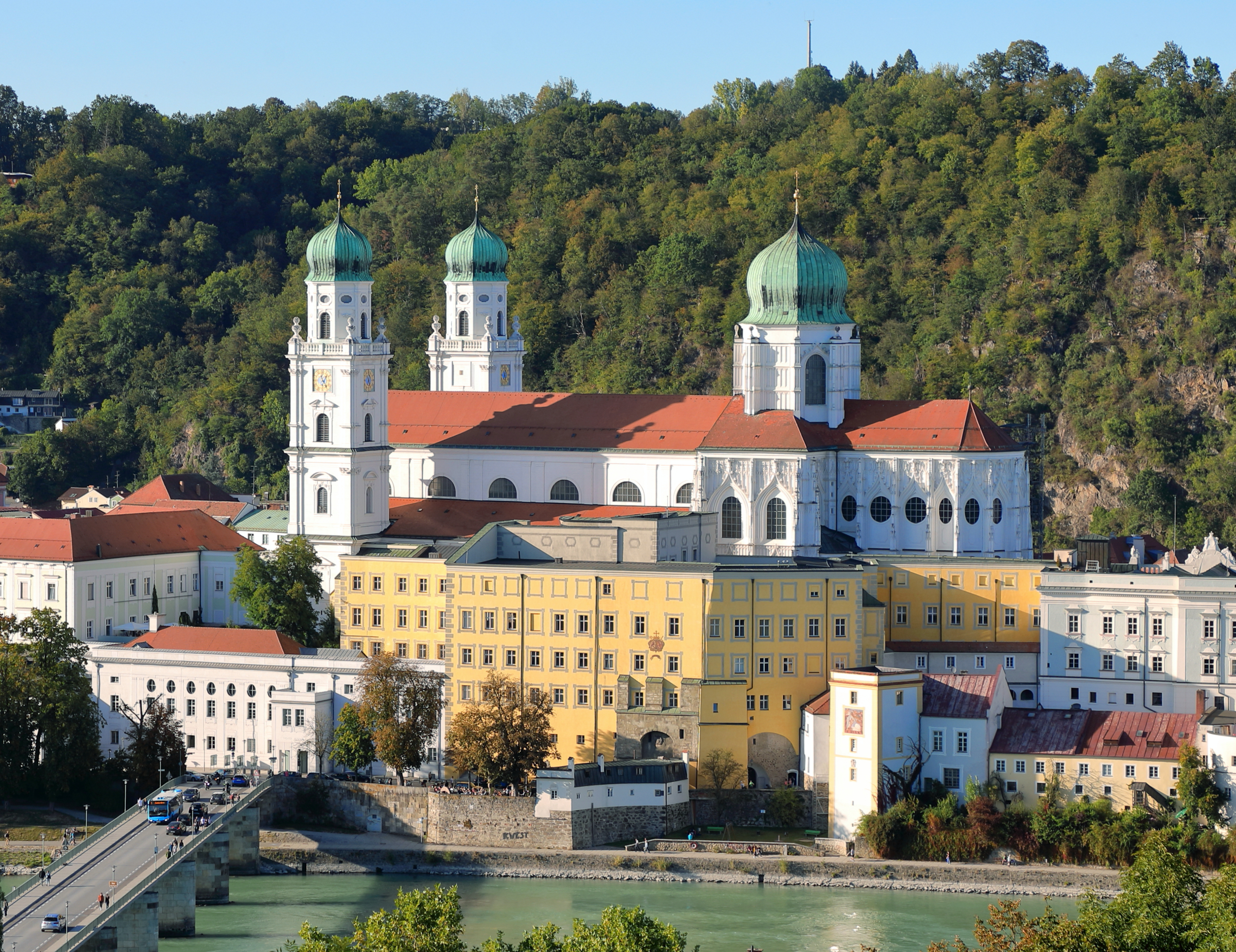 Blick vom Mariahilfberg auf den Passauer Dom mit der Alten Residenz im Vordergrund.